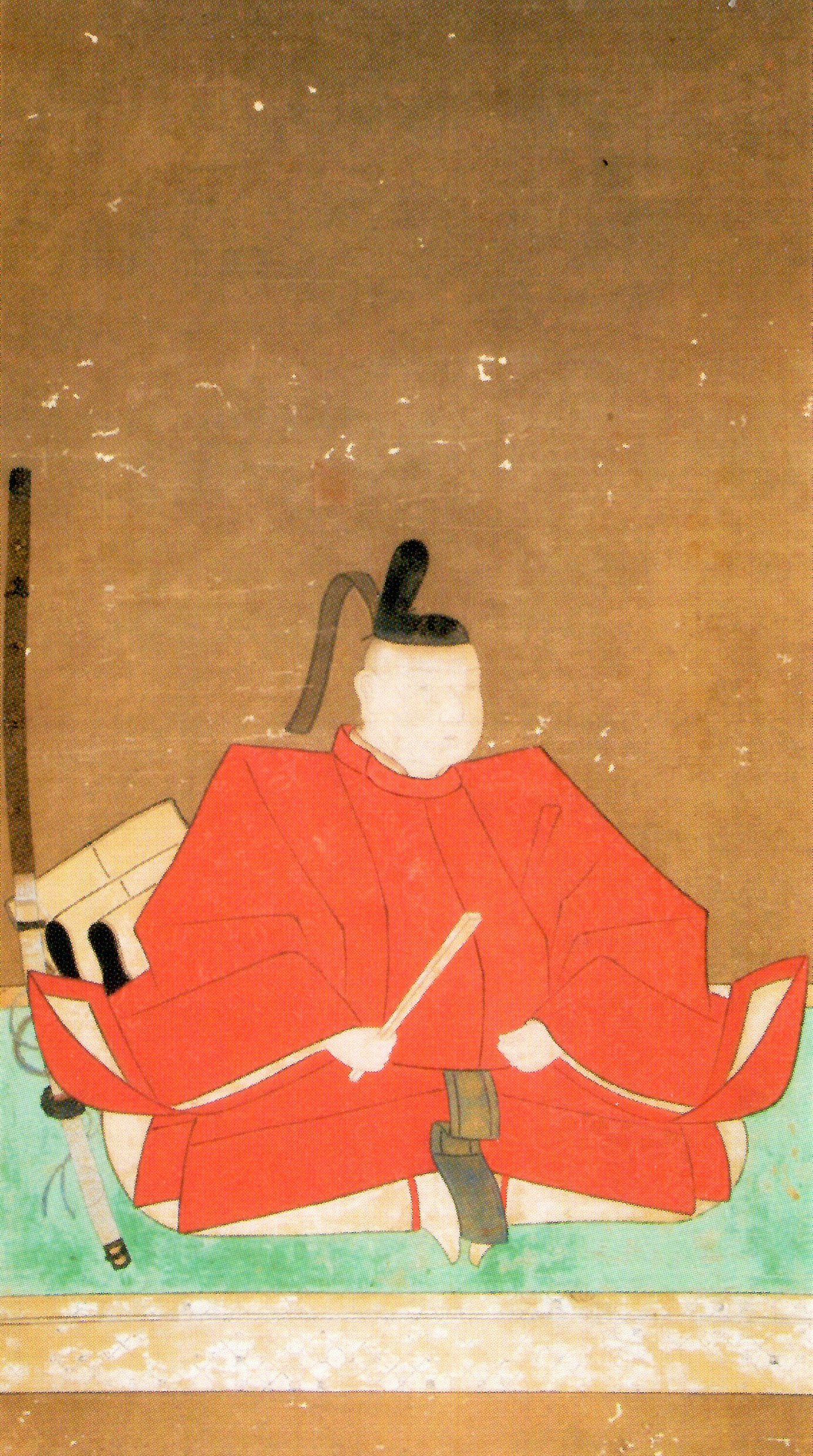 本多政敏の肖像。